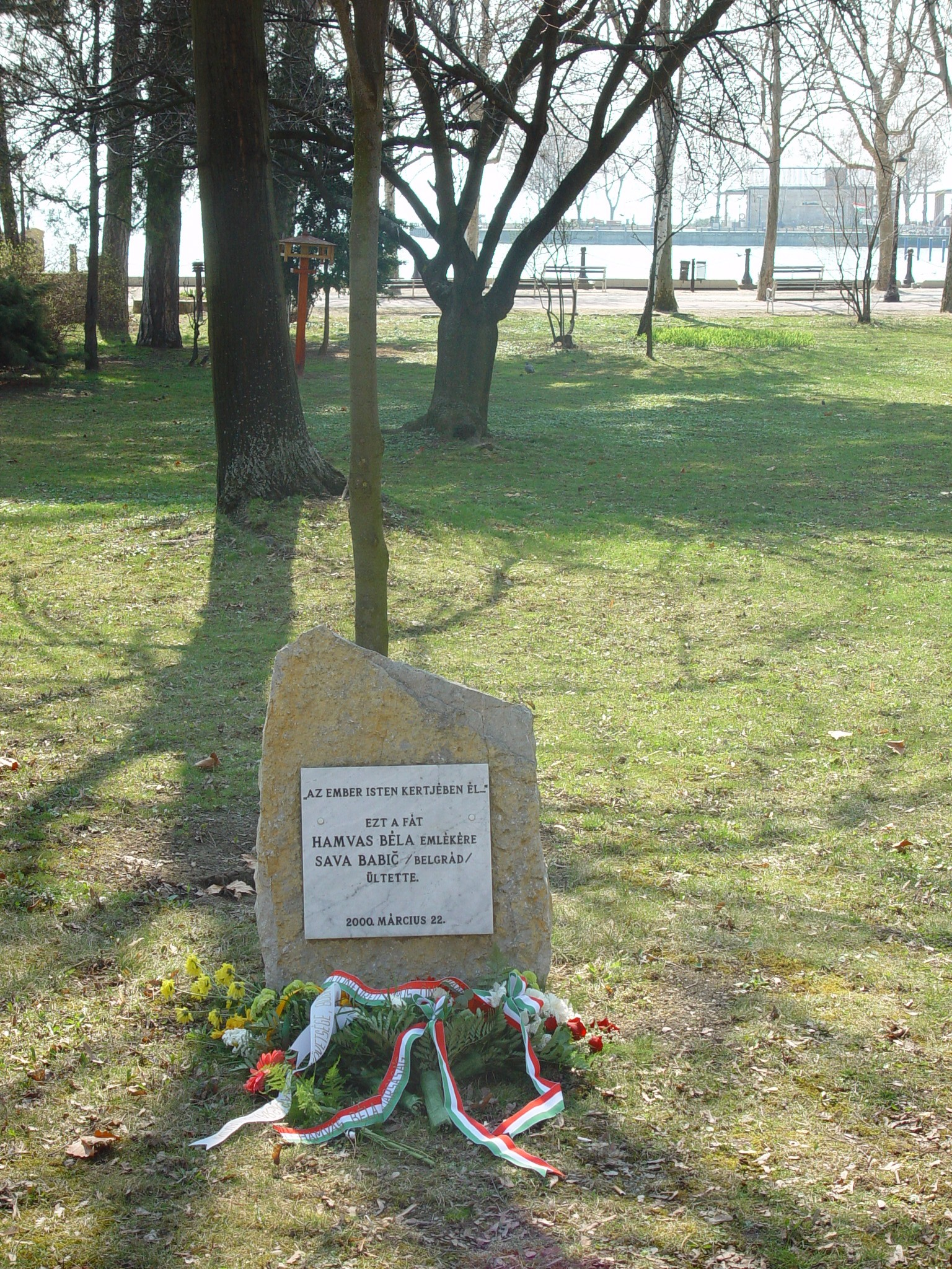 Hamvas Béla emléktábla, rajta egy jelmondat. (Balatonfüred, Tagore-sétány)